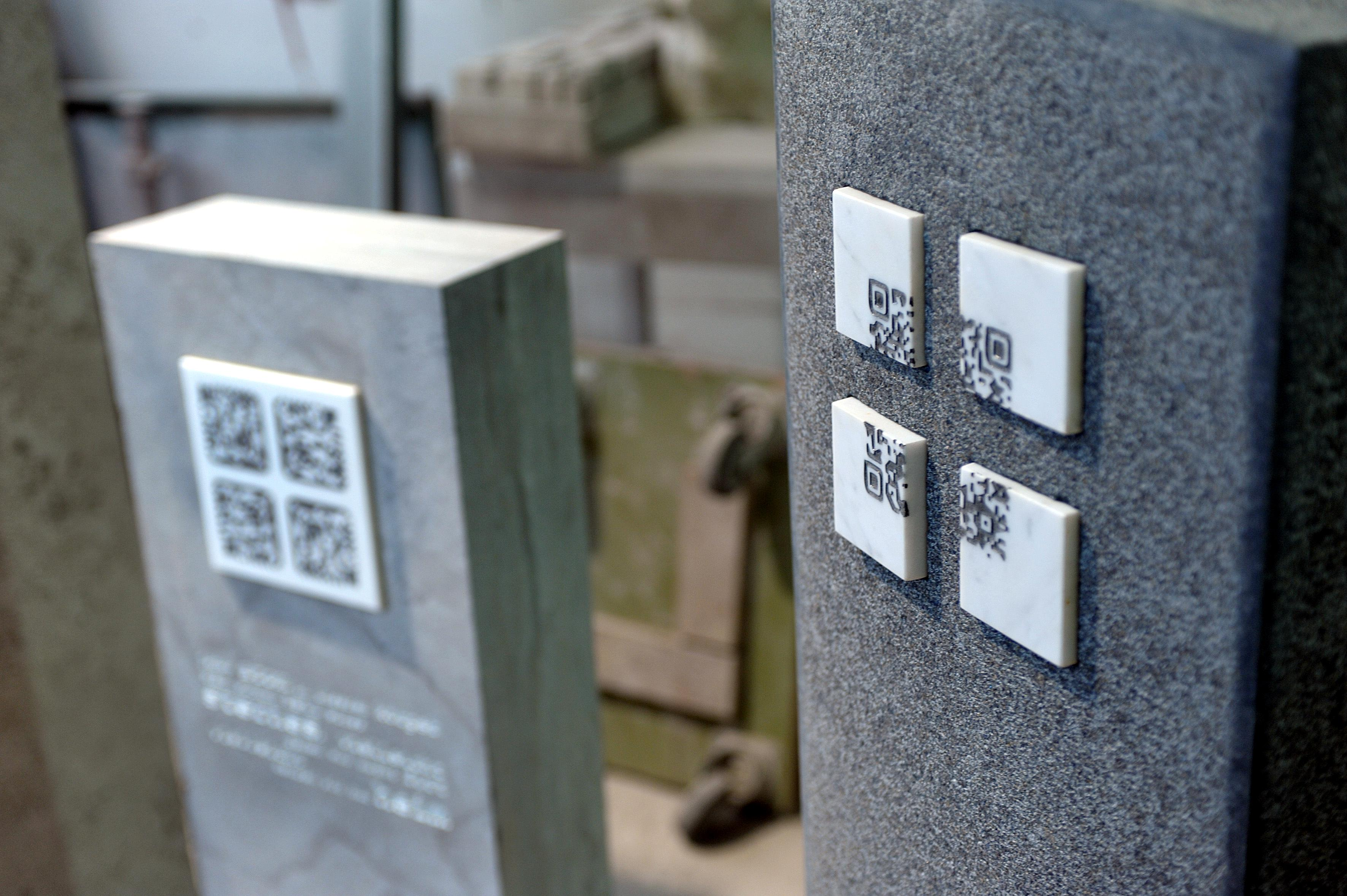 Digitale Grabsteine mit 2d-Barcodes, die vertieft, direkt und dadurch dauerhaft in den Naturstein gearbeitet wurde. Diese Grabsteine mit einem QR-Code und einem Semacode versehen, wurden 2012 und 2013 in der Kölner Steinmetzwerkstatt 'steinart' – durch den Bildhauer und Steinmetzmeisters Andreas Rosenkranz – erstellt. 2013_steinart.info